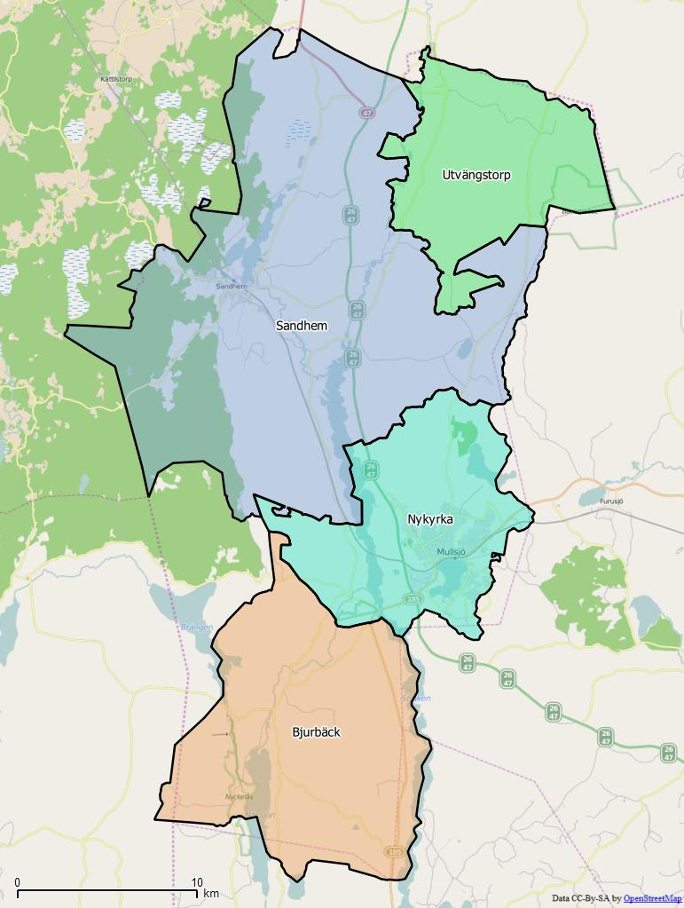 Distriktsindelningen i Mullsjö kommun World file: 49.4744707986180785 0 0 -49.4744707986180785 1520041.1151091658975929 7980582.25670205149799585